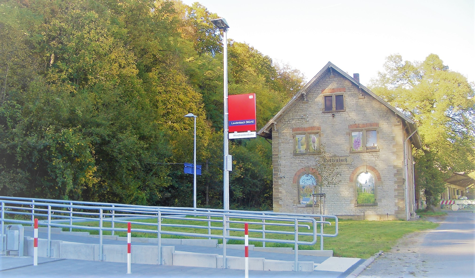 Ansicht von der Strassenseite